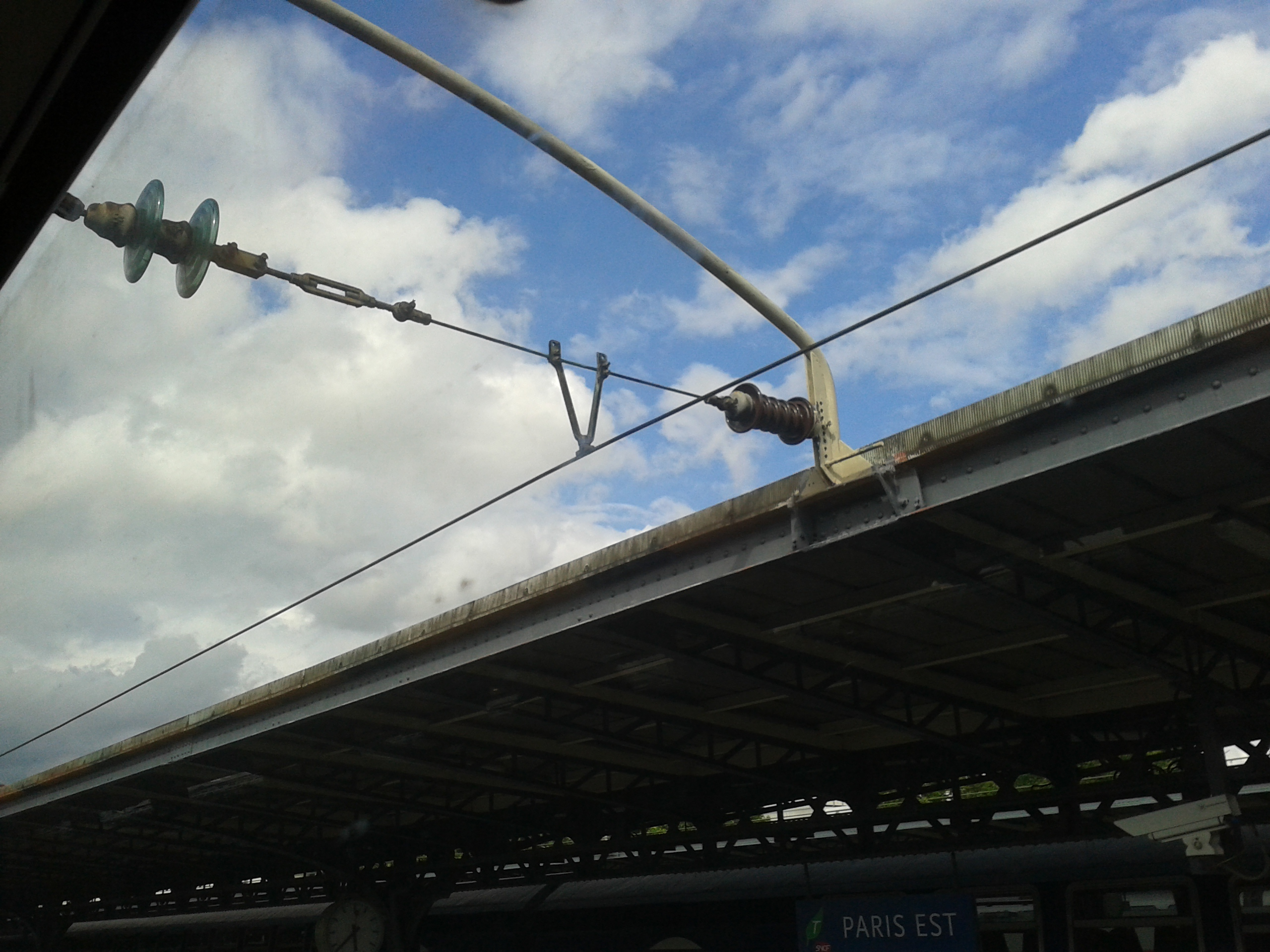 Isolateur et suspension des caténaires 25kV à la gare de Paris-Est (photo prise depuis un train à étage).